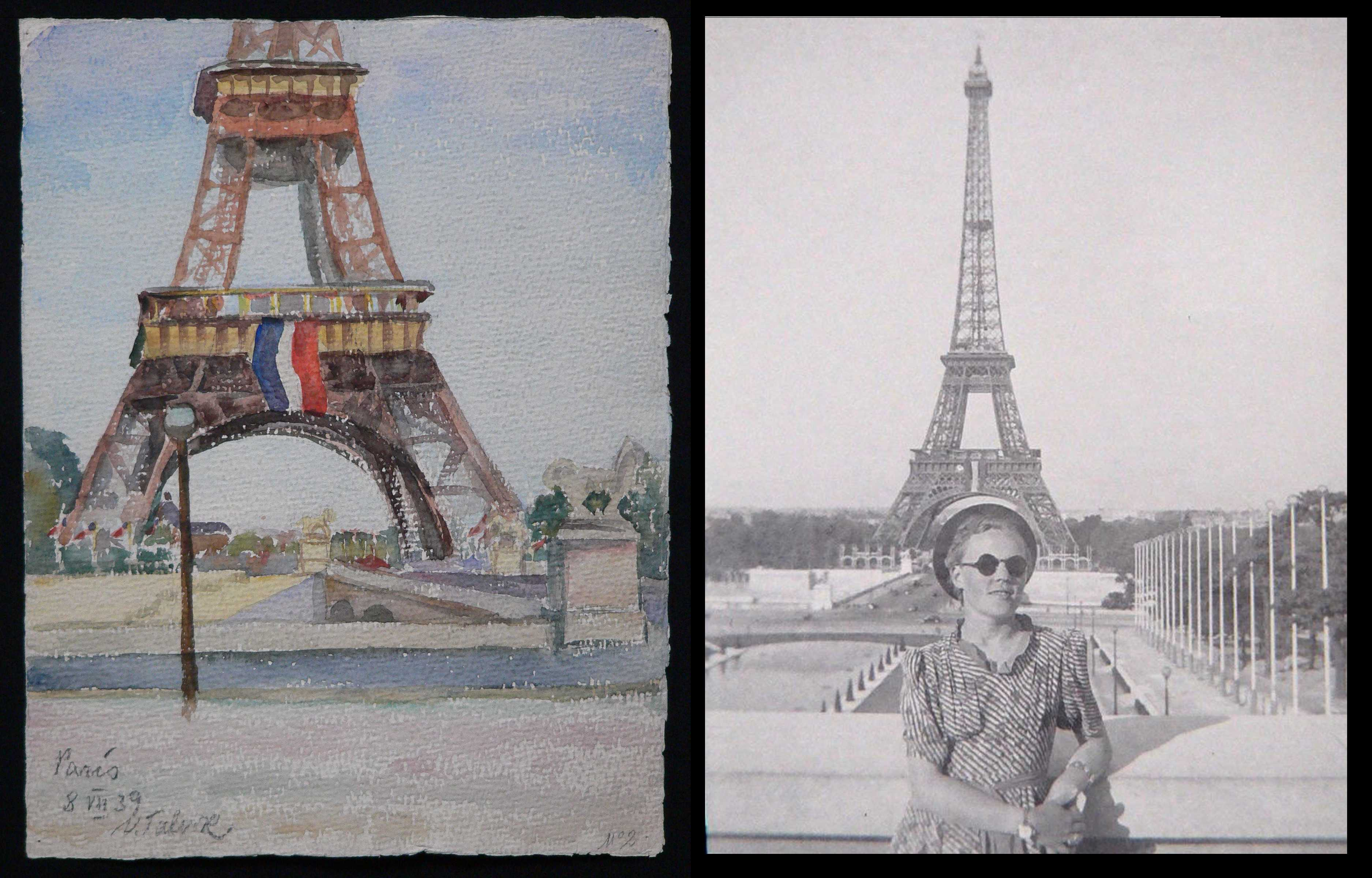 Valli akvarell ja Voldemar Elleri foto 1939. aastal Pariisis. Arvo Elleri montaazh.